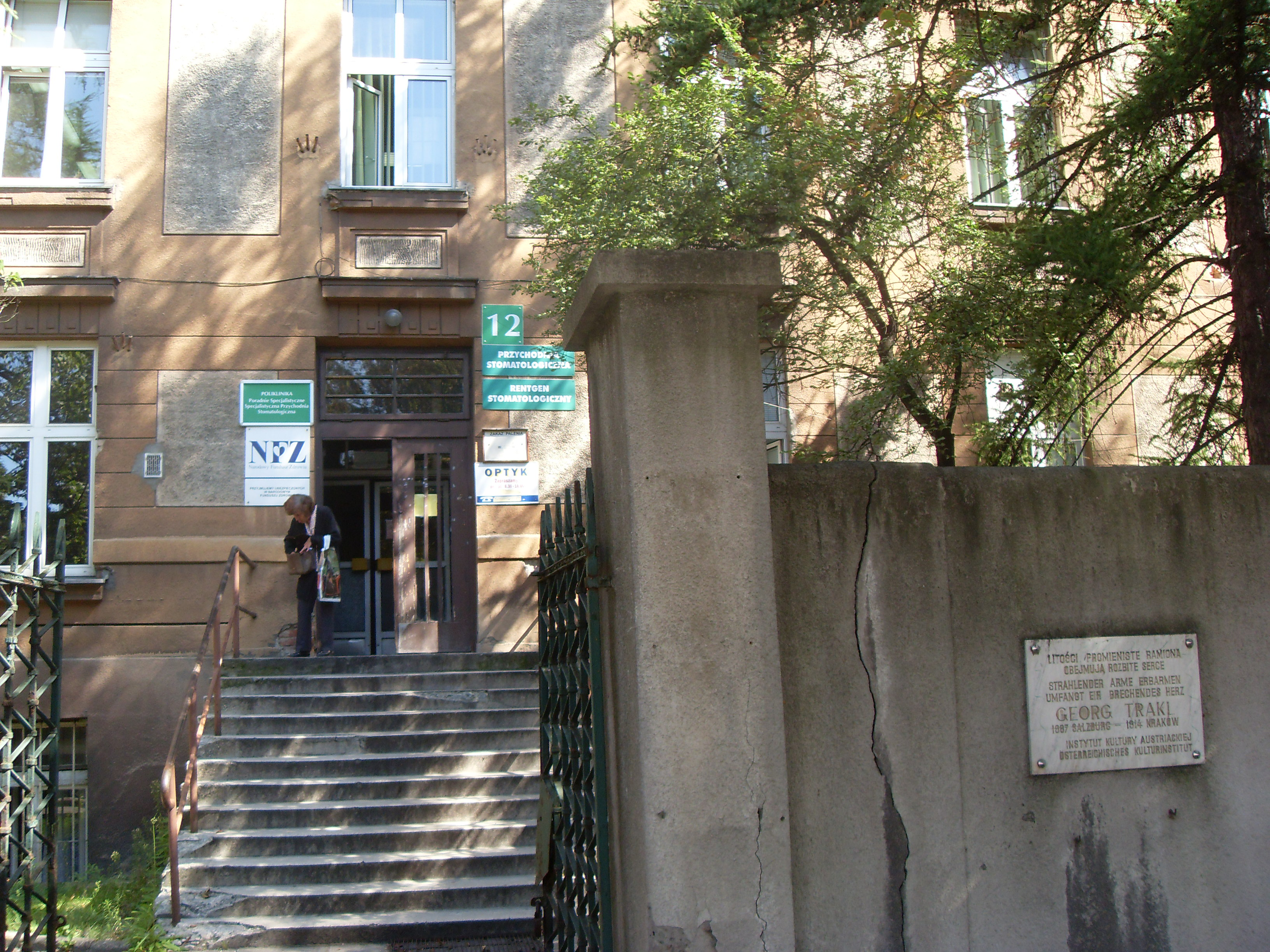 Szpital, w którym zmarł Georg Trakl, Kraków, ul. Wrocławska